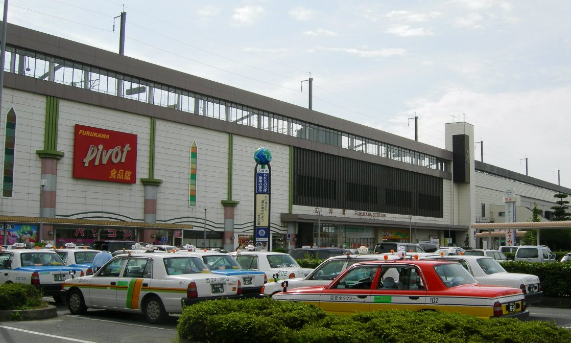 JR古川駅駅舎全景（JR Furukawa station）